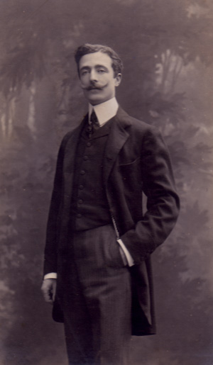 Vittorio Gnecchi Ruscone, 1904